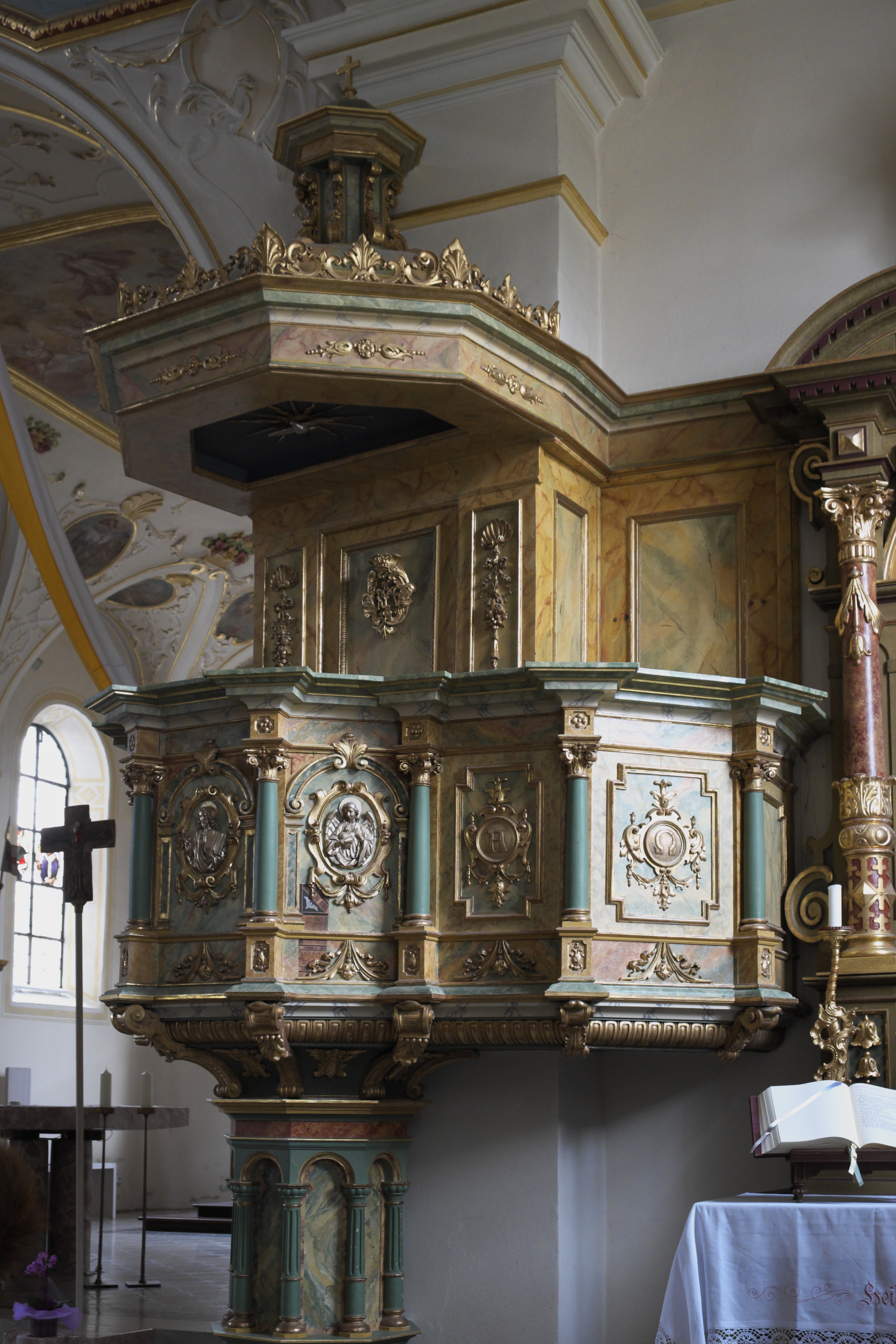 Katholische Pfarrkirche St. Benedikt in Odelzhausen im Landkreis Dachau (Bayern/Deutschland), Kanzel